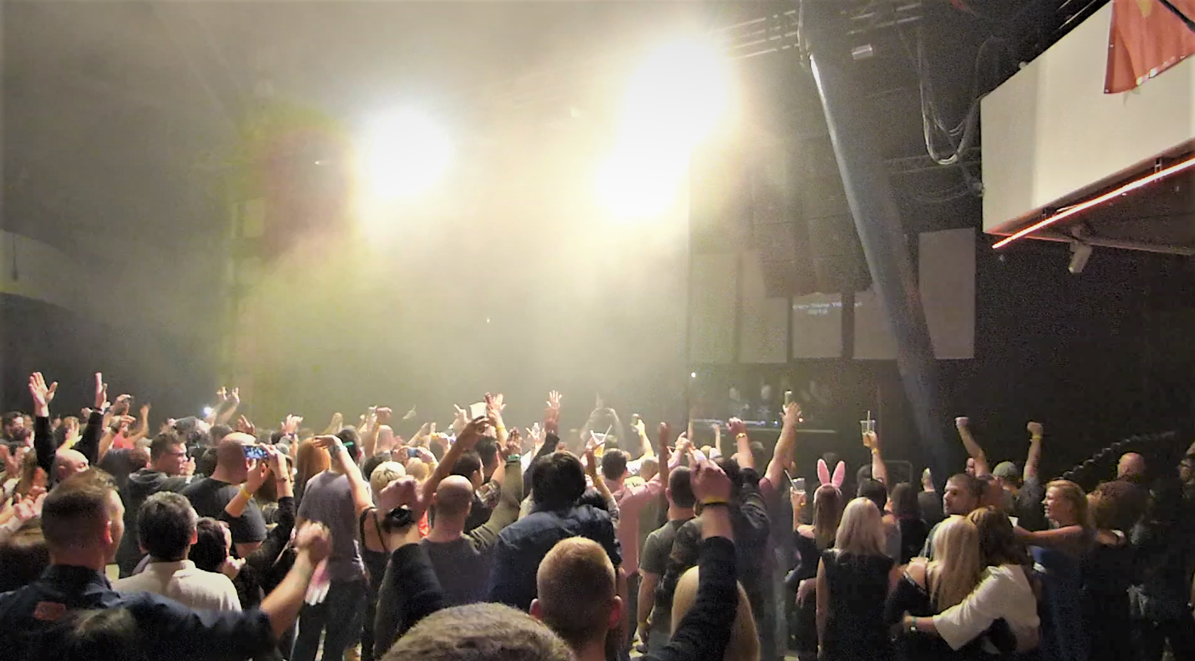 A felvétel 2017. december 31-én, Szilveszter napján készült éjfélkor a Millenáris B épületében. A közönség az újév pillanatát ünnepli. 3D (Danny Howells, Dave Seaman, Darren Emerson) és Anthony Pappa DJ elektronikus zenéje